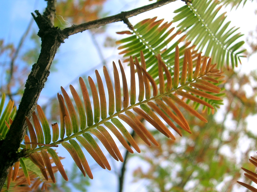 arbortum, near Nancy "Dawn Redwood"